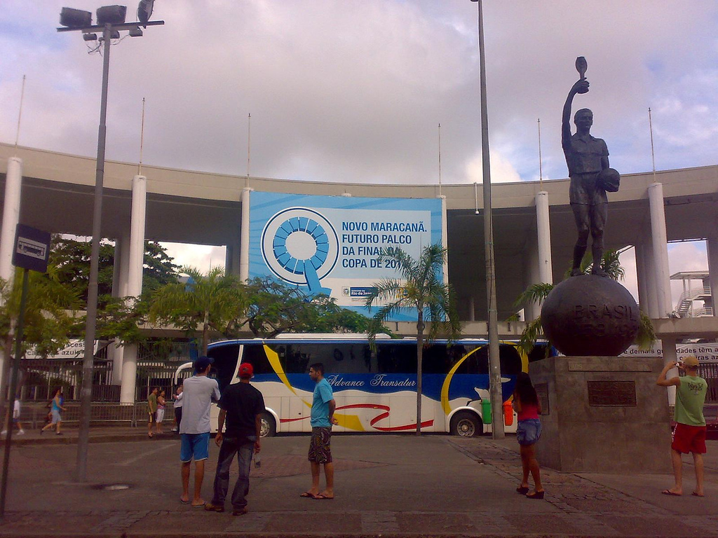 Estátua do Bellini na entrada do Maracanã, Rio de Janeiro.